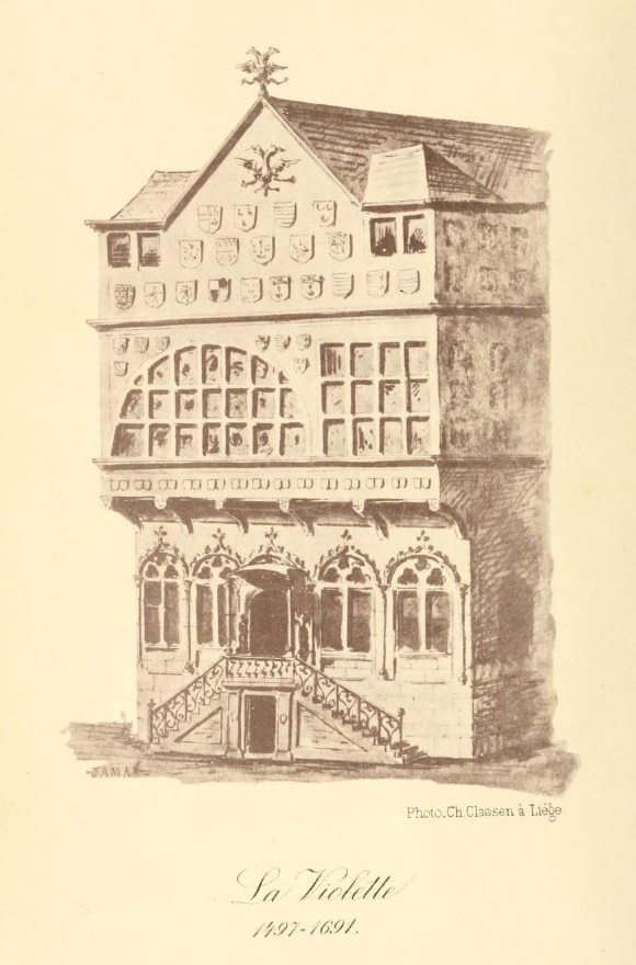 Hotel de ville de Liège entre 1497 et 1691